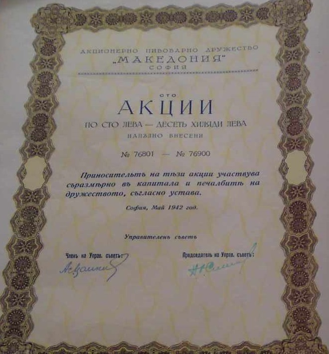 Акция на Акционно пивоварно дружество „Македония“